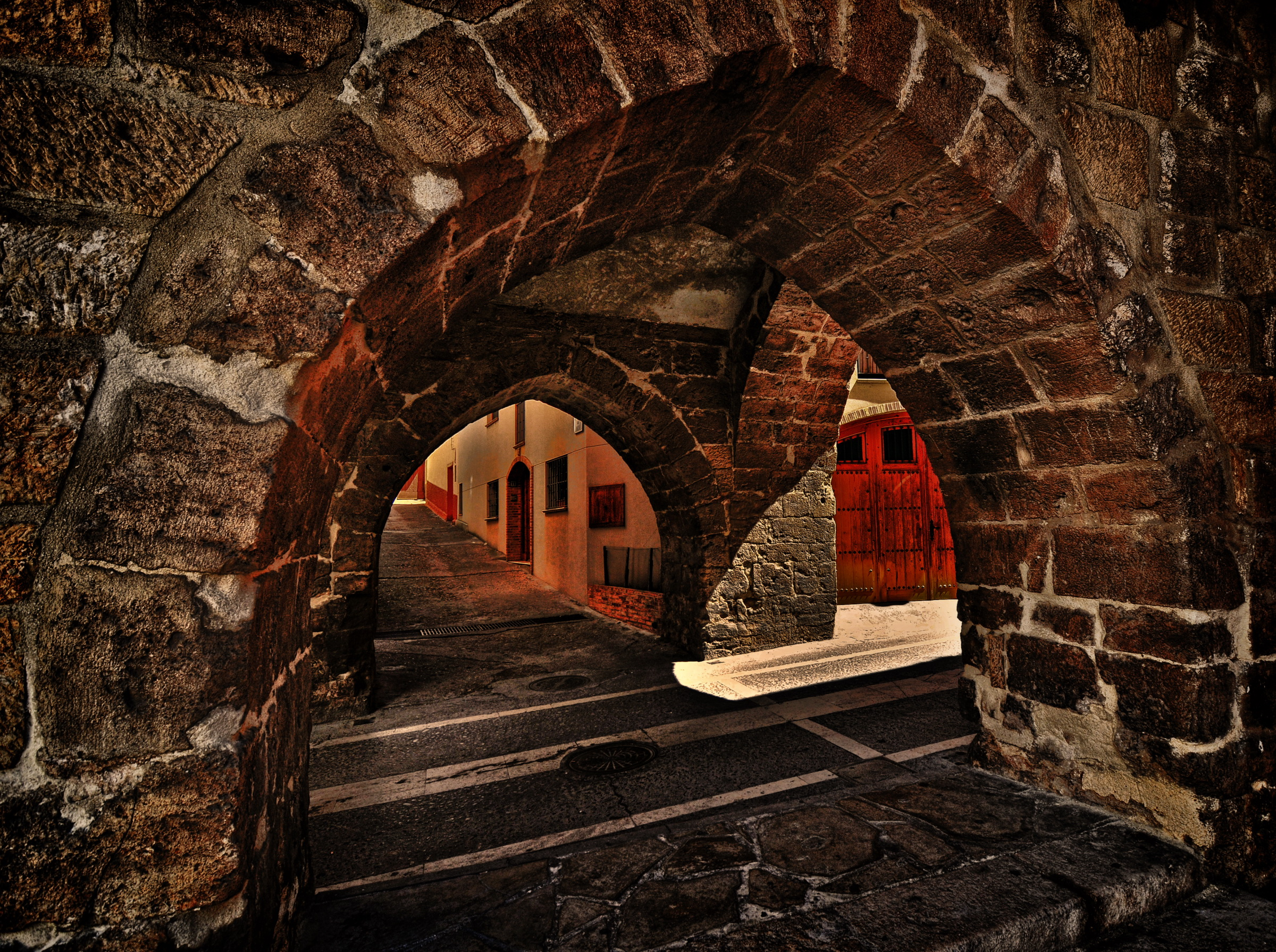 Montalban Portal de Daroca